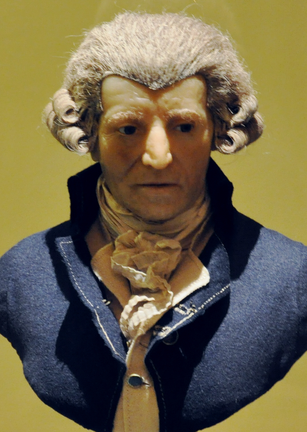 Büste Joseph Haydn, von Franz Christian Thaler, Wachsbüste mit natürlichen Haaren und Kleiderstücken auf vergoldetem Postament; Wien um 1800 Wien, Kunsthistorisches Museum, Sammlung alter Musikinstrumente (Neue Burg), Inv. Nr. SAM 350